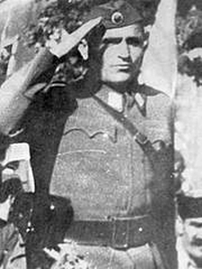 Vlado Segrt, generale del EPLJ/ NOVJ e comandante della Decima brigata erzegovese e della Ventinovesima divisione erzegovese